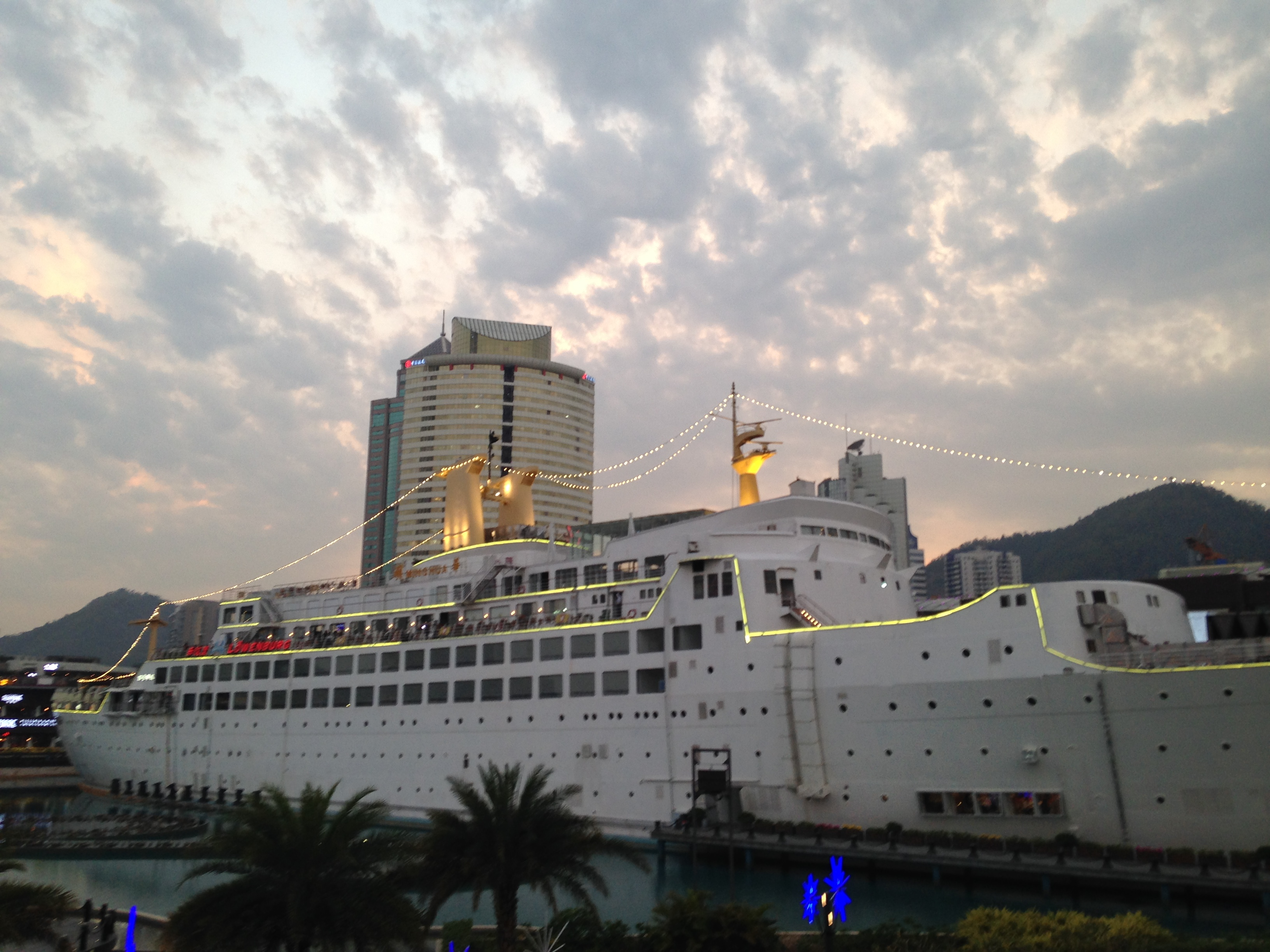 蛇口海上世界の明華輪